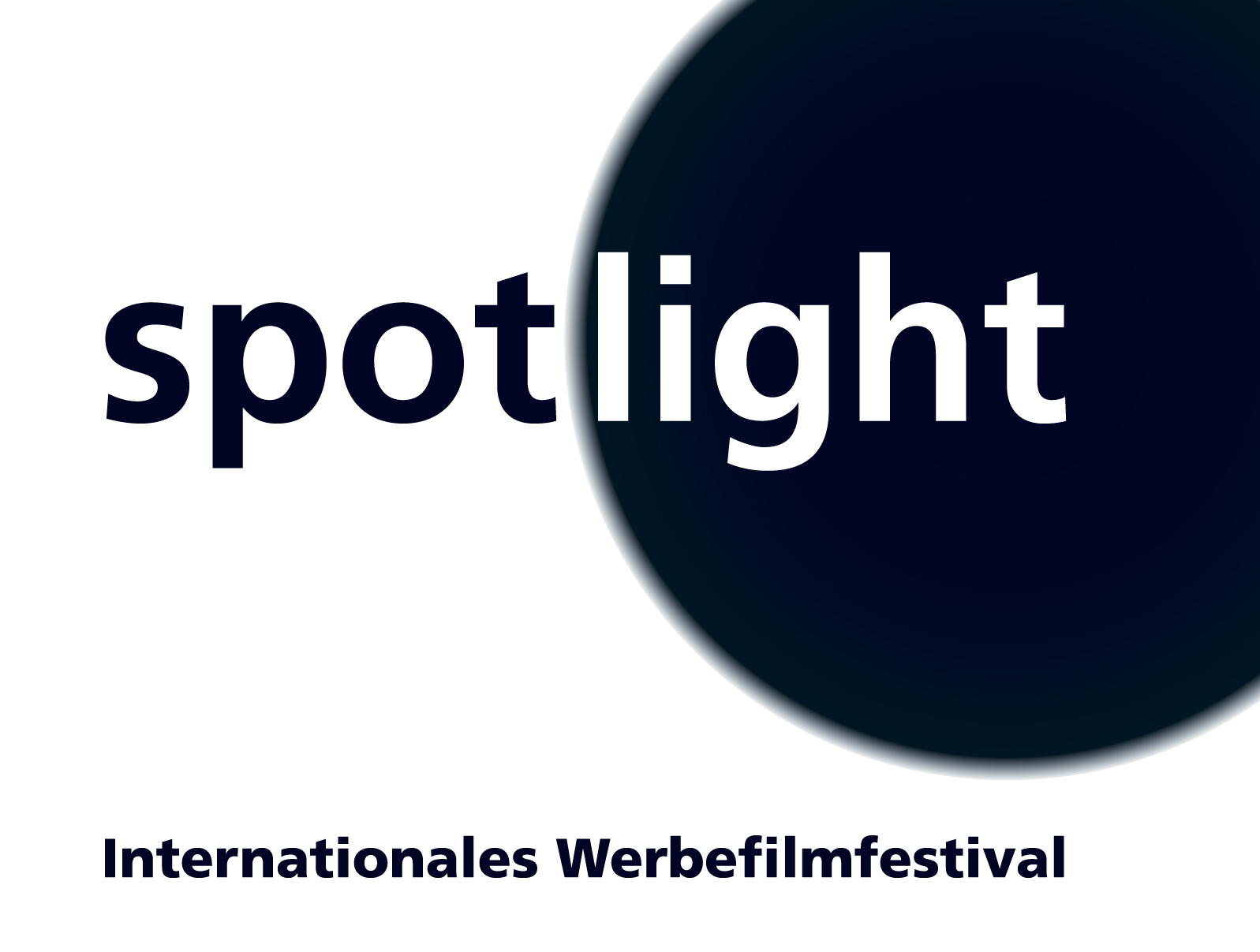 Logo Spotlight-Festival